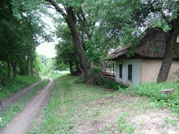 хутір Качани, літо 2015